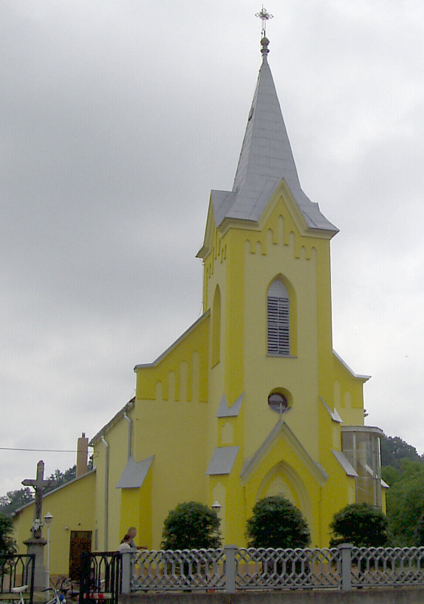 Rímskokatolícky kostol Kučín